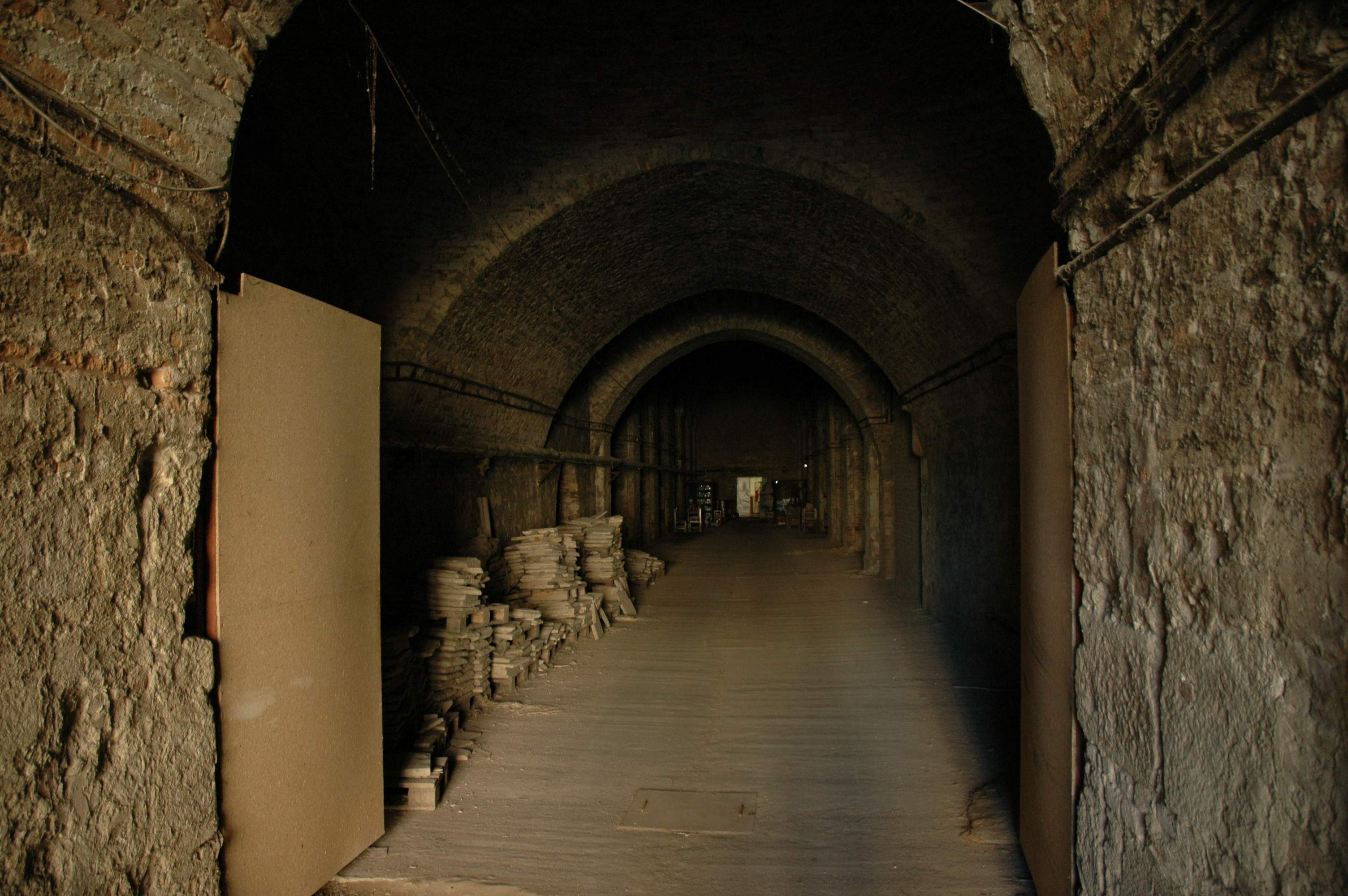 Prímási pincerendszer, Esztergom